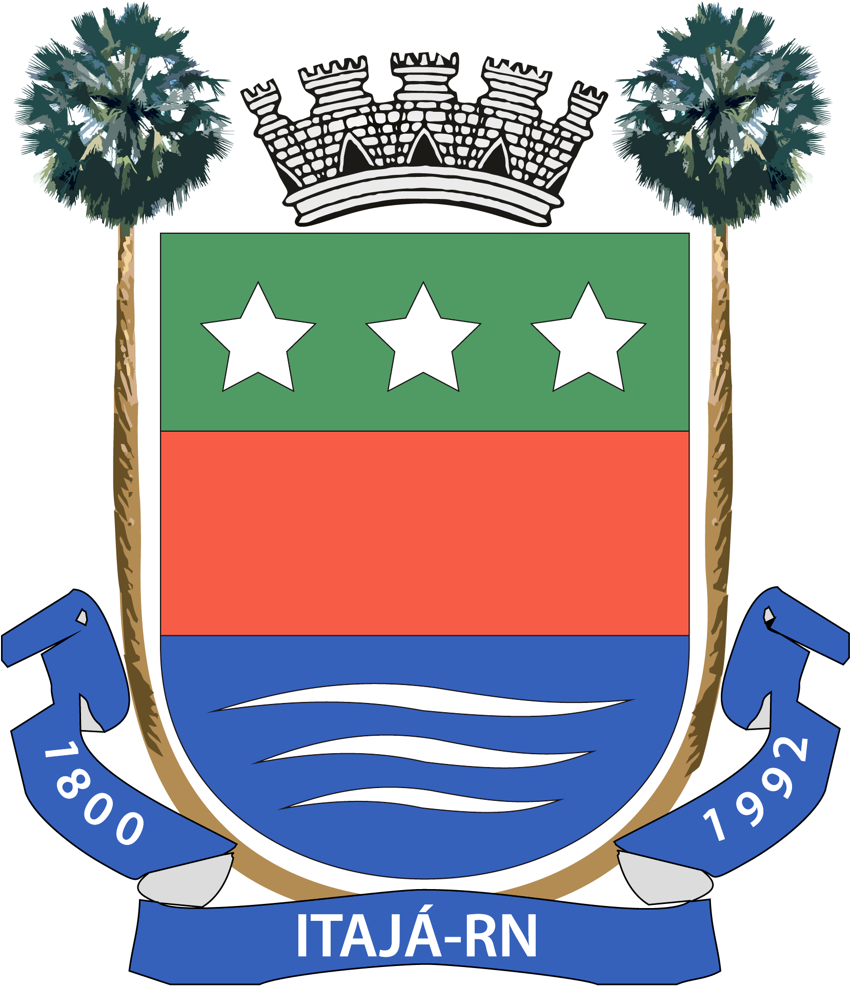 Autor: Evangelista Lopes